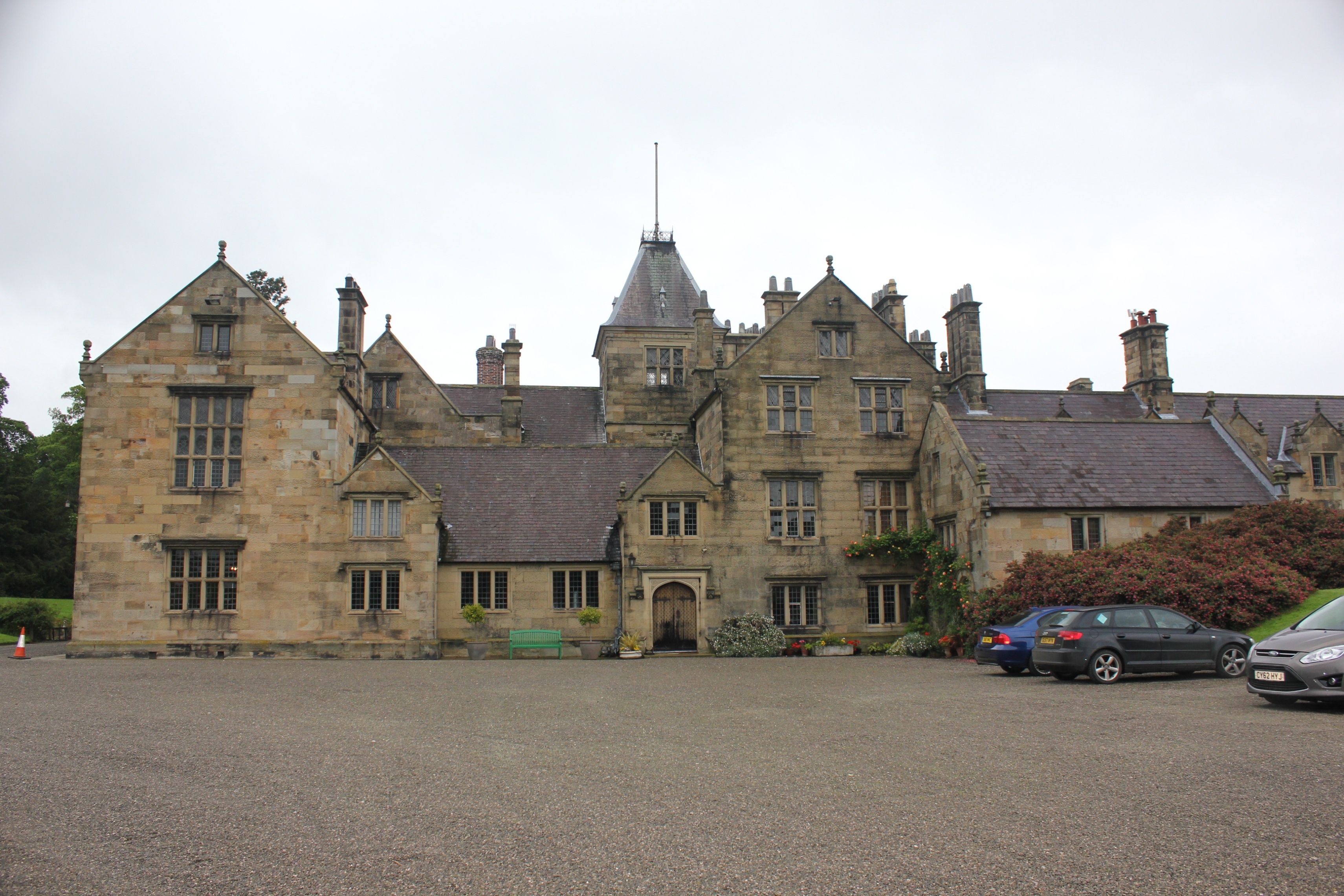 Mostyn Hall